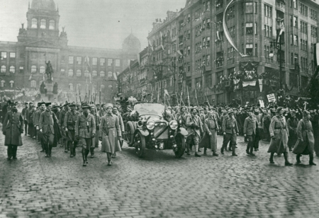 Pohřeb čs legionářů v Praze